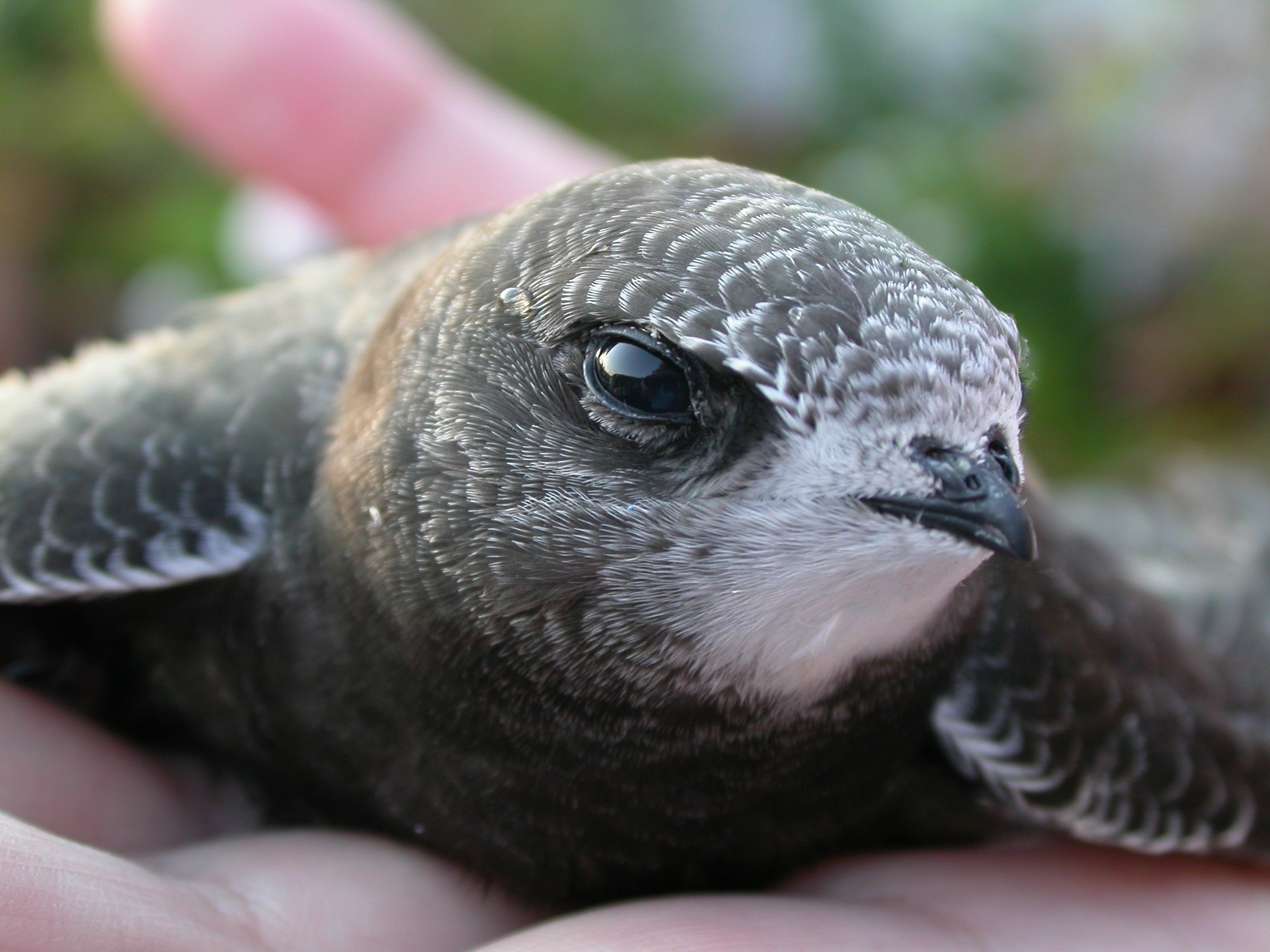 Junger Mauersegler von vorn